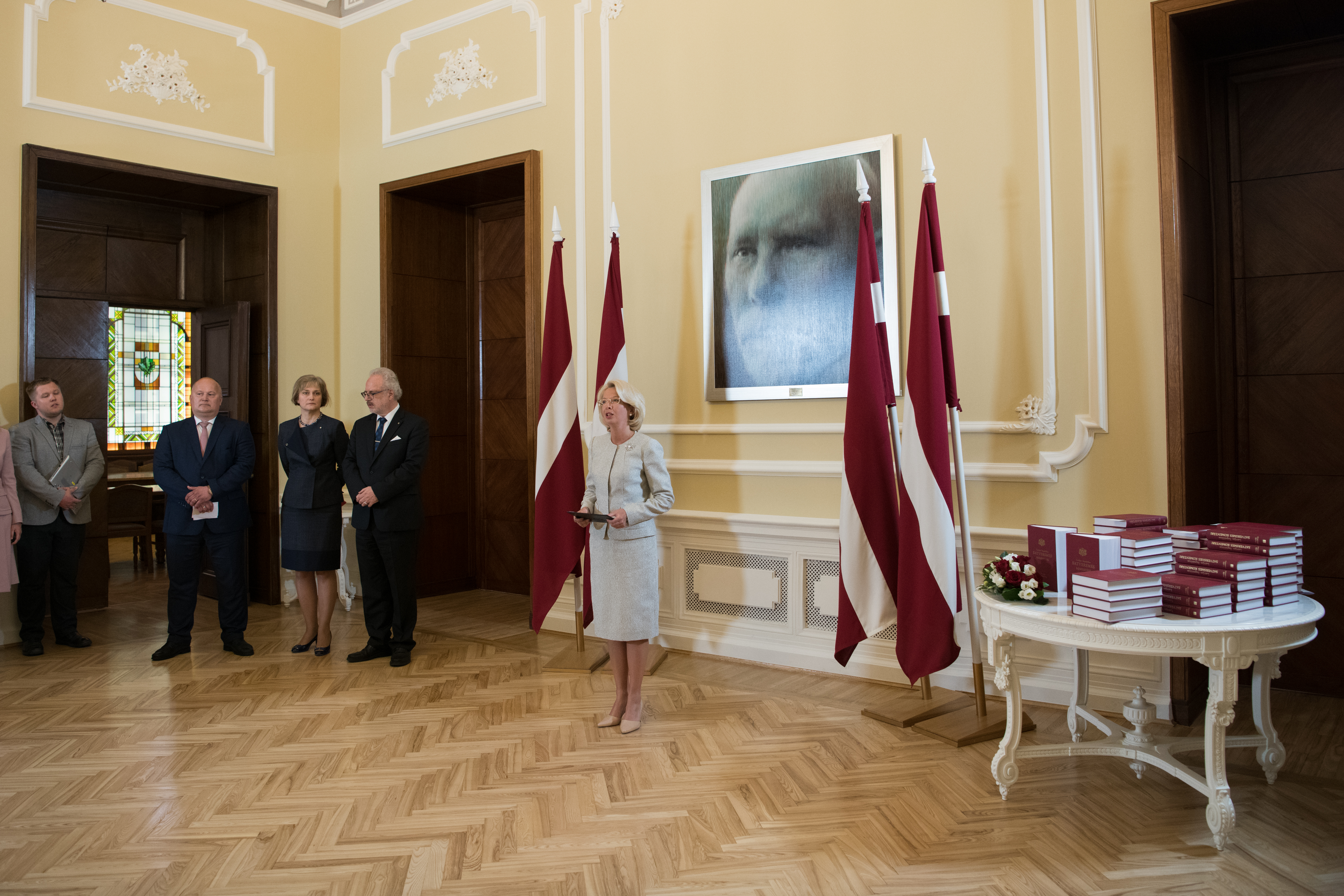 Saeimas priekšsēdētājas Ināras Mūrnieces svinīgā uzruna grāmatas „Latvijas Republikas Satversmes komentāri. V. nodaļa. ‘’Likumdošana” atvēršanas svētkos 2019. gada 11. jūnijā